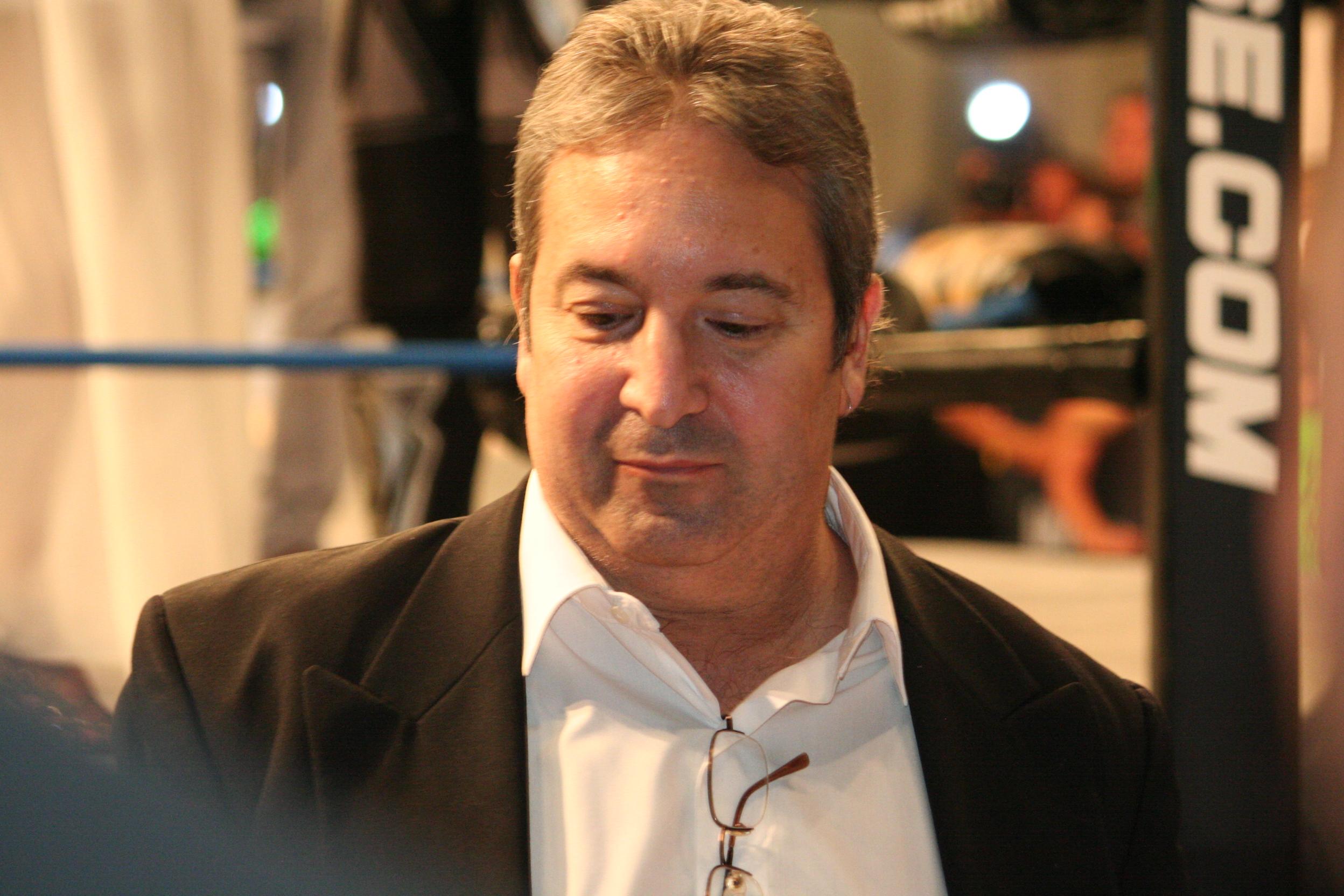 Dave Penzer